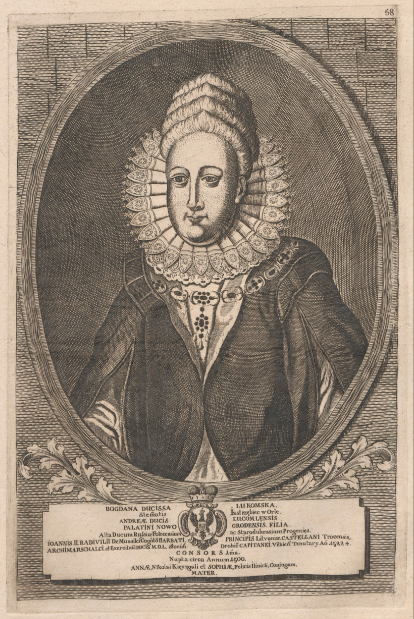 Беларуская (тарашкевіца): Партрэт Багданы Радзівіл (Bahdana Radzivił) з роду Лукомскіх (Łukomski)